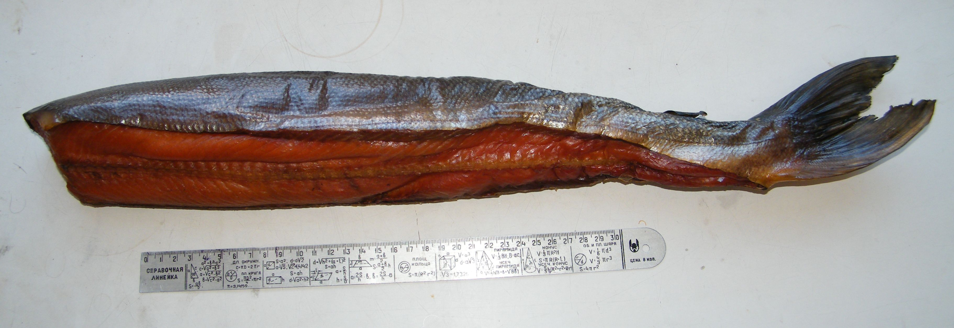 Балык из кеты